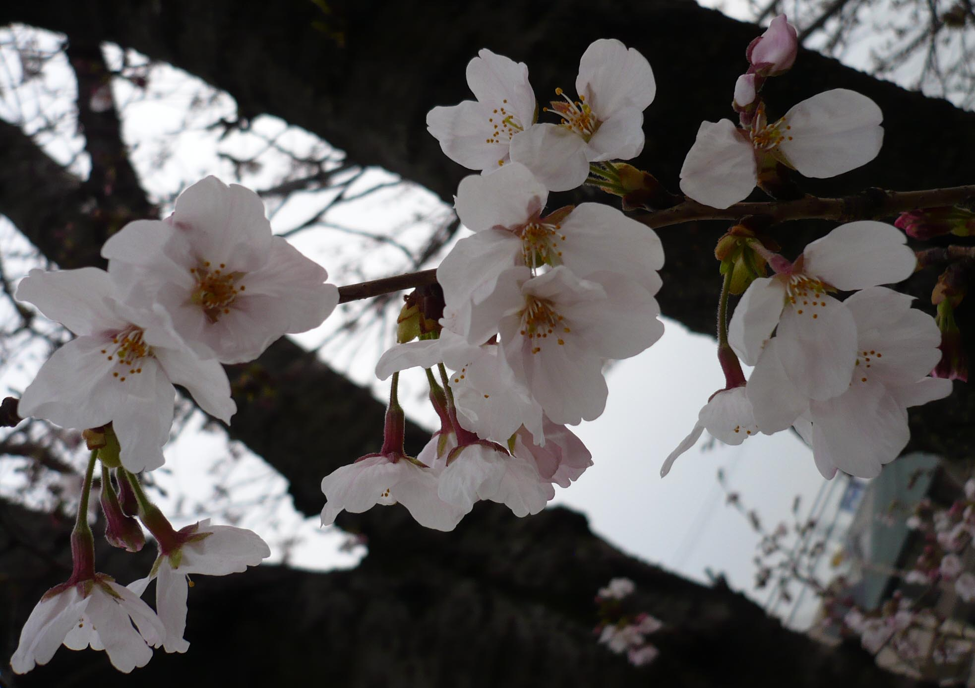 定の山古墳山頂の咲いていた桜